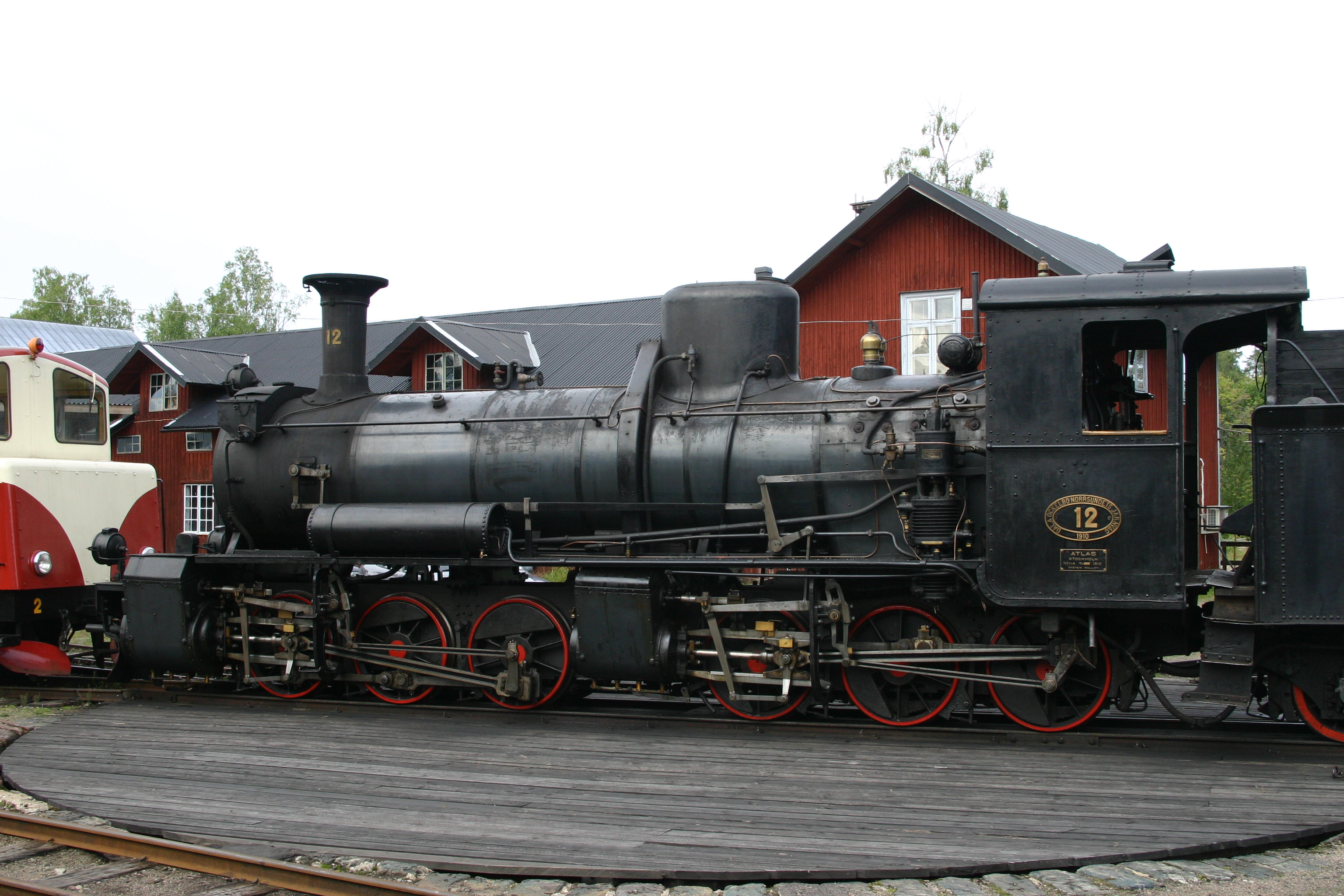 Schmalspurdampflokomotive 12 der DONJ in Jädraås 16.08.08 (2)